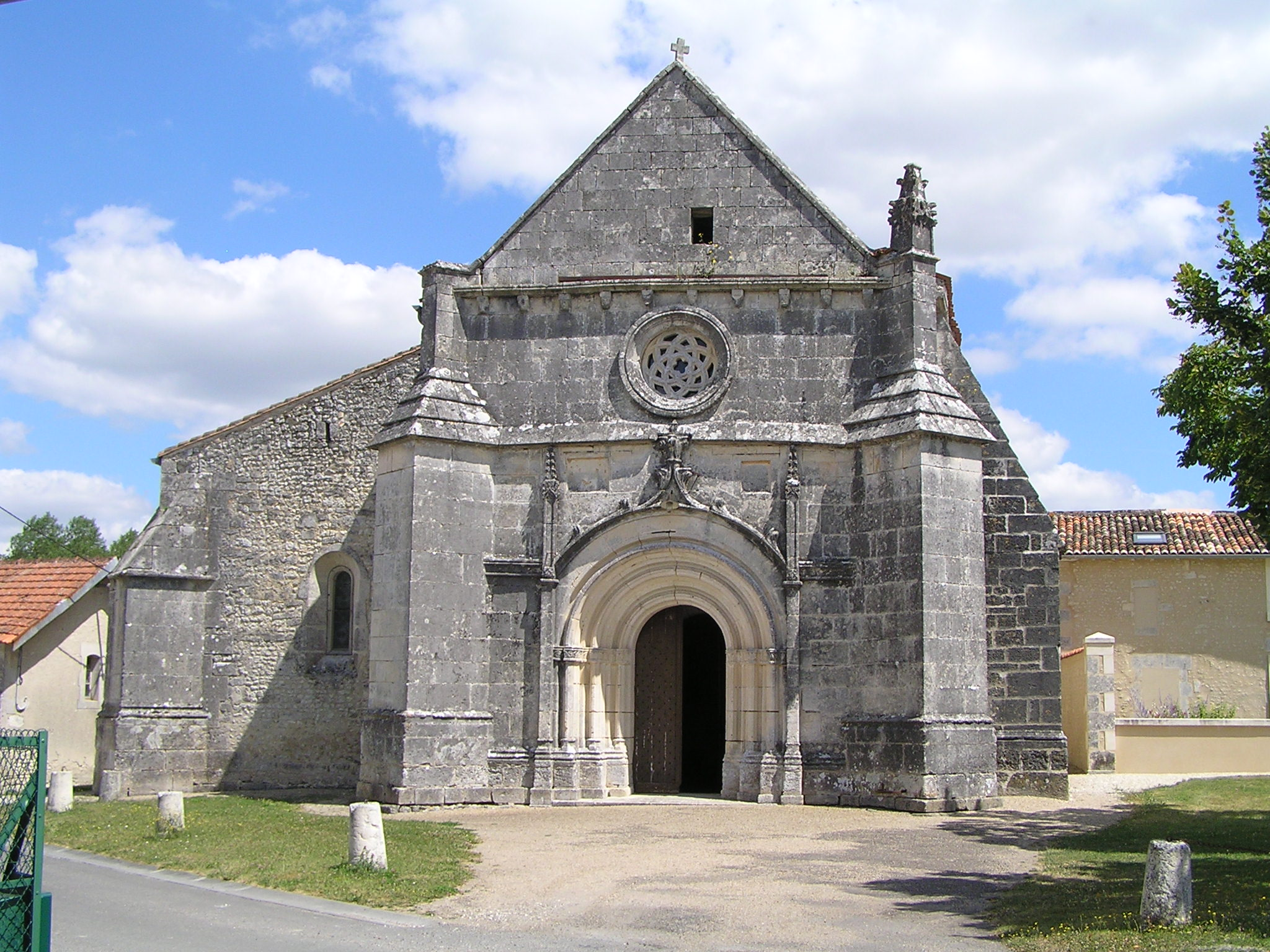 église de Lachaise, prieuré St-Vivien, Charente, France